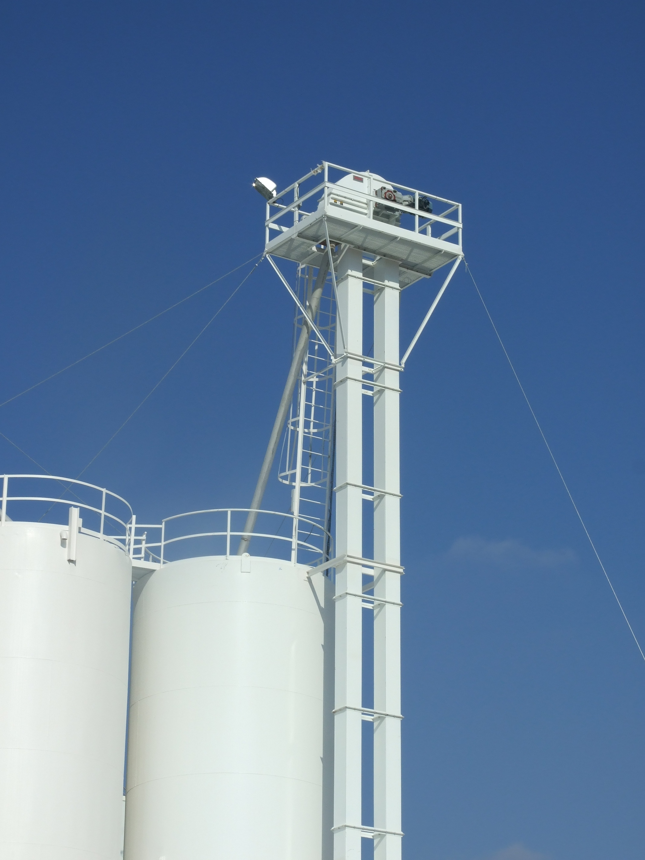 Elevador de cangilones sinfimasa de banda